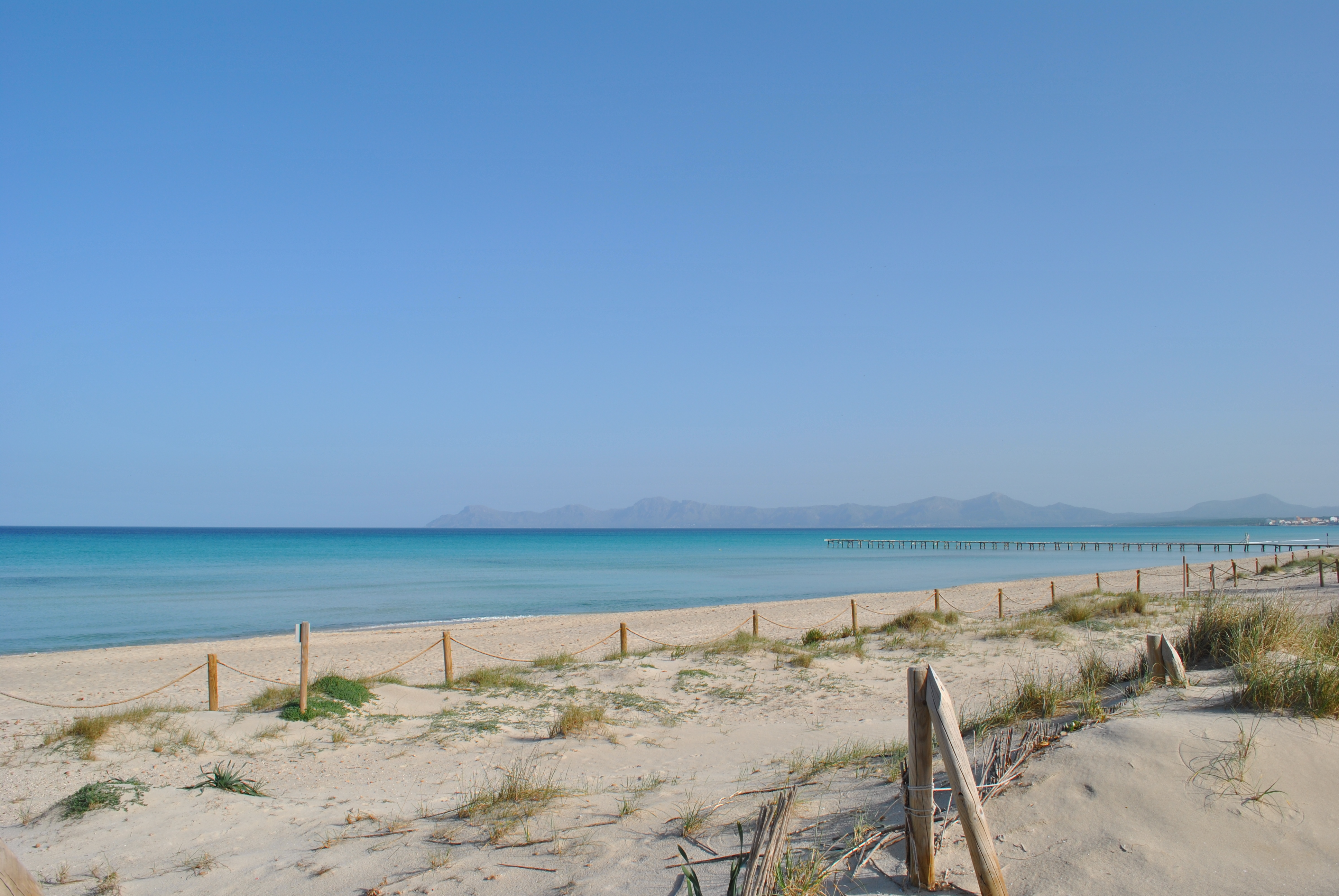 Platja de Muro This is a a photo of a beach in the Balearic Islands, Spain, with id: PL-IB-44001